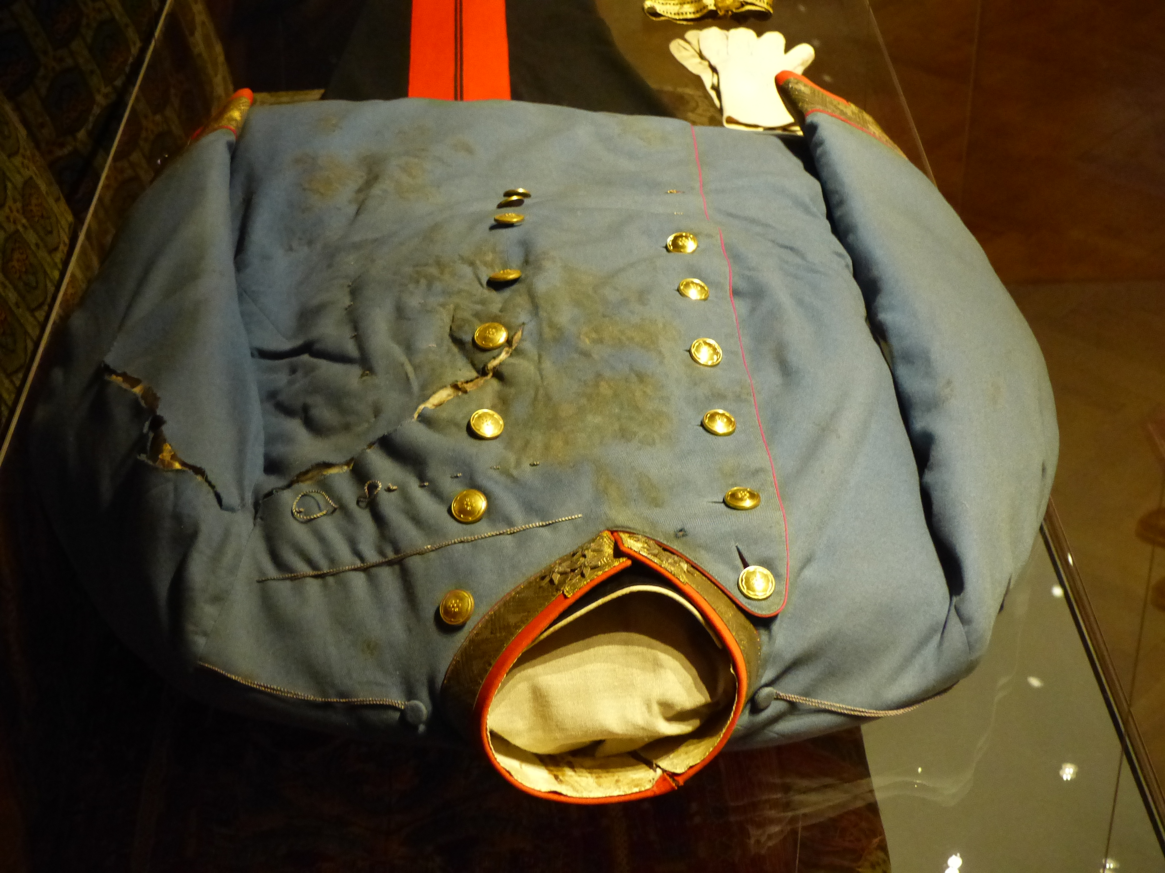 Uniform von Thronfolger Franz Ferdinand, die er während des Attentats in Sarajevo 1914 getragen hatte